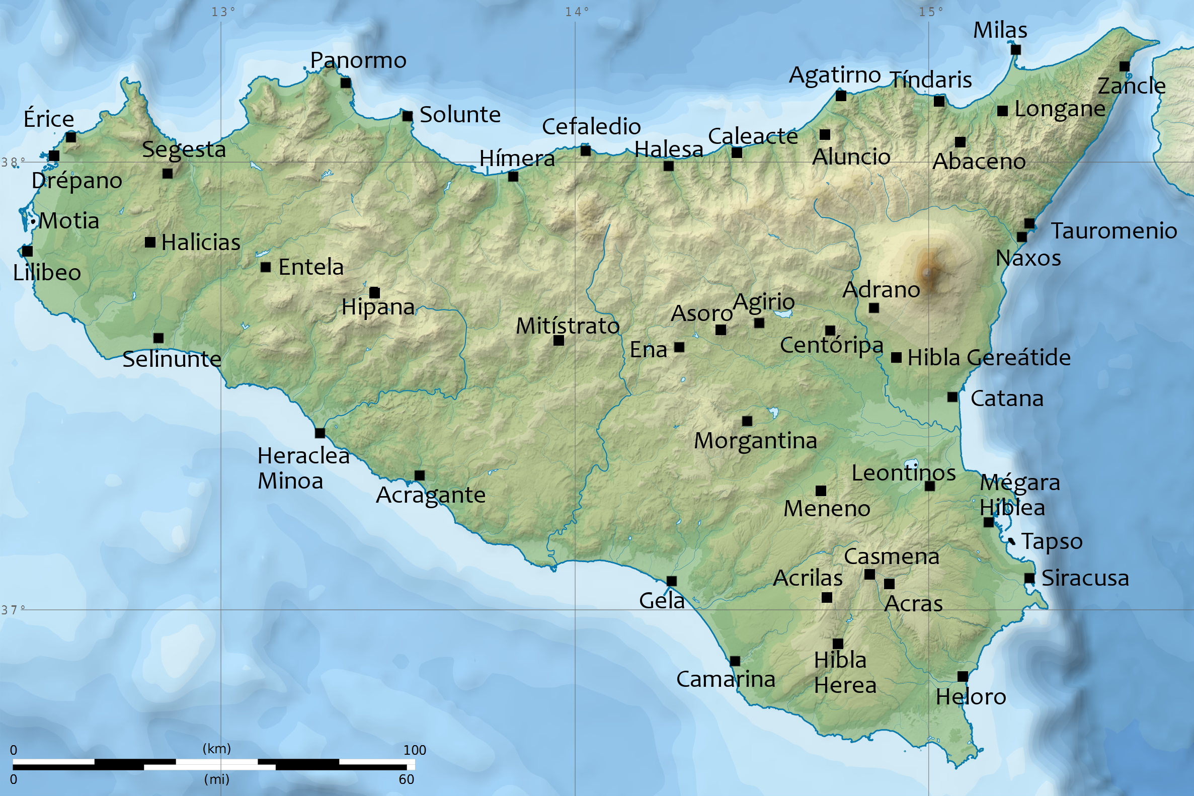 Mapa de algunas de las principales ciudades de Sicilia en la Antigüedad.